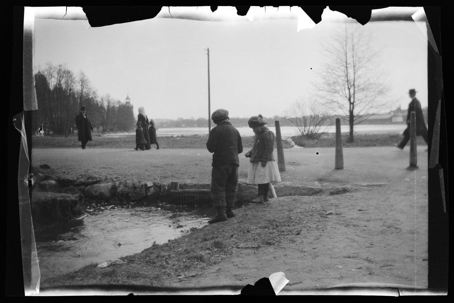 HS Sårad ängel 56.2 valokuvafilmi, selluloosanitraatti, leveys 82 mm, korkeus 55 mm Asiasanat: valokuvat, kaupunkimaisema, puisto, Eläintarha, Töölönlahti, pohjoisranta (nykyinen(2012) Helsinginkatu-Vauhtitie risteys, pohjoissivu, ojanpää), Alppilan lammikot, laskuoja Töölönlahteen, lapsi(2), vas. Linnunlaulun ranta, huvila 12, torni, taustalla Töölönlahti ; teos Simberg, Hugo, Haavoittunut enkeli (1903), paikka Hugo Simbergin jäljillä - Kansallisgalleria, Hugo Simbergin arkisto